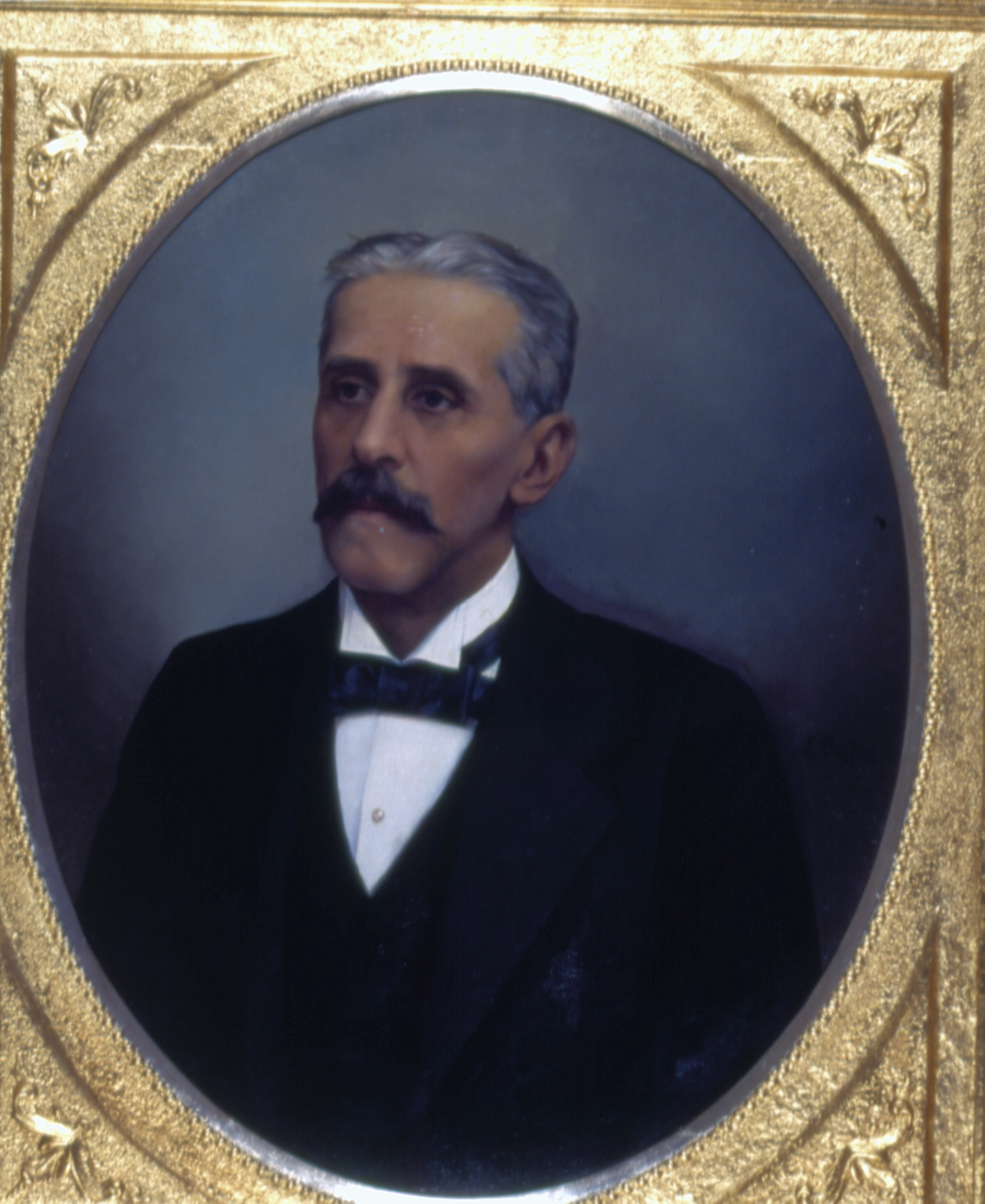 Obra que integra o acervo do Museu Paulista da USP.